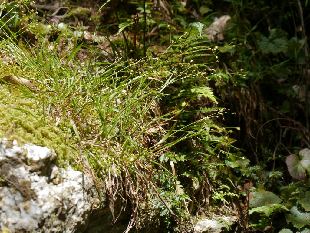 2017/05/07 和歌山県：Wakayama Pref. Japan